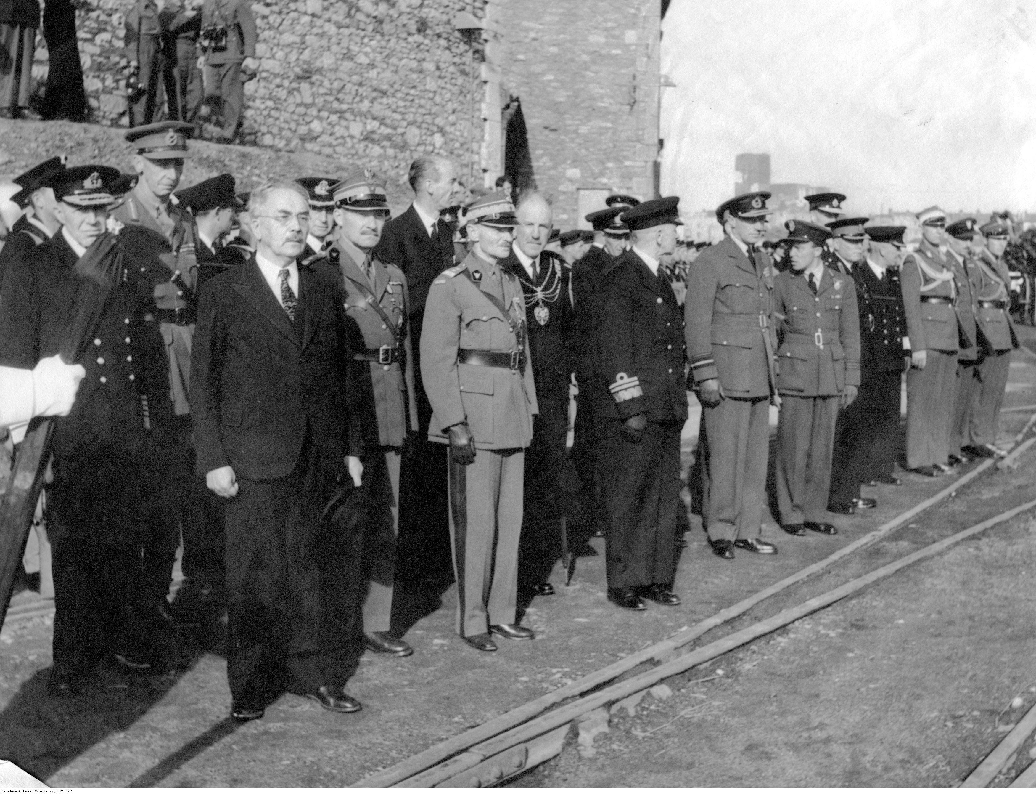 Uczestnicy uroczystości. W pierwszym rzędzie od lewej: minister informacji i dokumentacji Stanisław Kot, minister obrony narodowej gen. Marian Kukiel. Widoczny także m.in. szef Gabinetu Wojskowego Prezydenta RP gen. Stefan Dembiński (na prawo za ministrem Kotem).